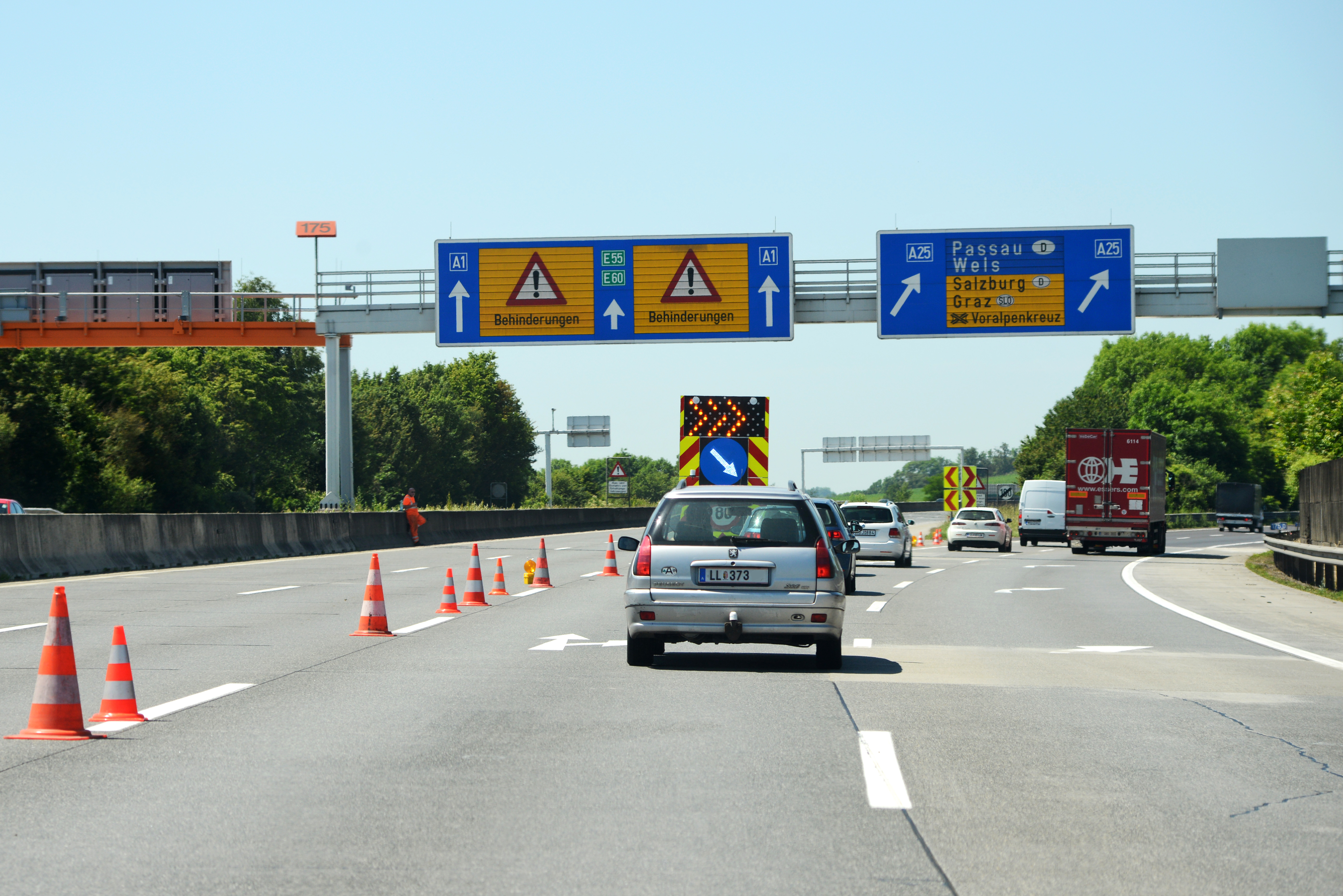 A1 Westautobahn, Knoten Haid Fahrtrichtung Salzburg. Wegen eines Unfalls wurde der Verkehr über die A25 umgeleitet.